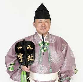 木村行宏（きむらゆきひろ） 玉ノ井部屋所属 行司